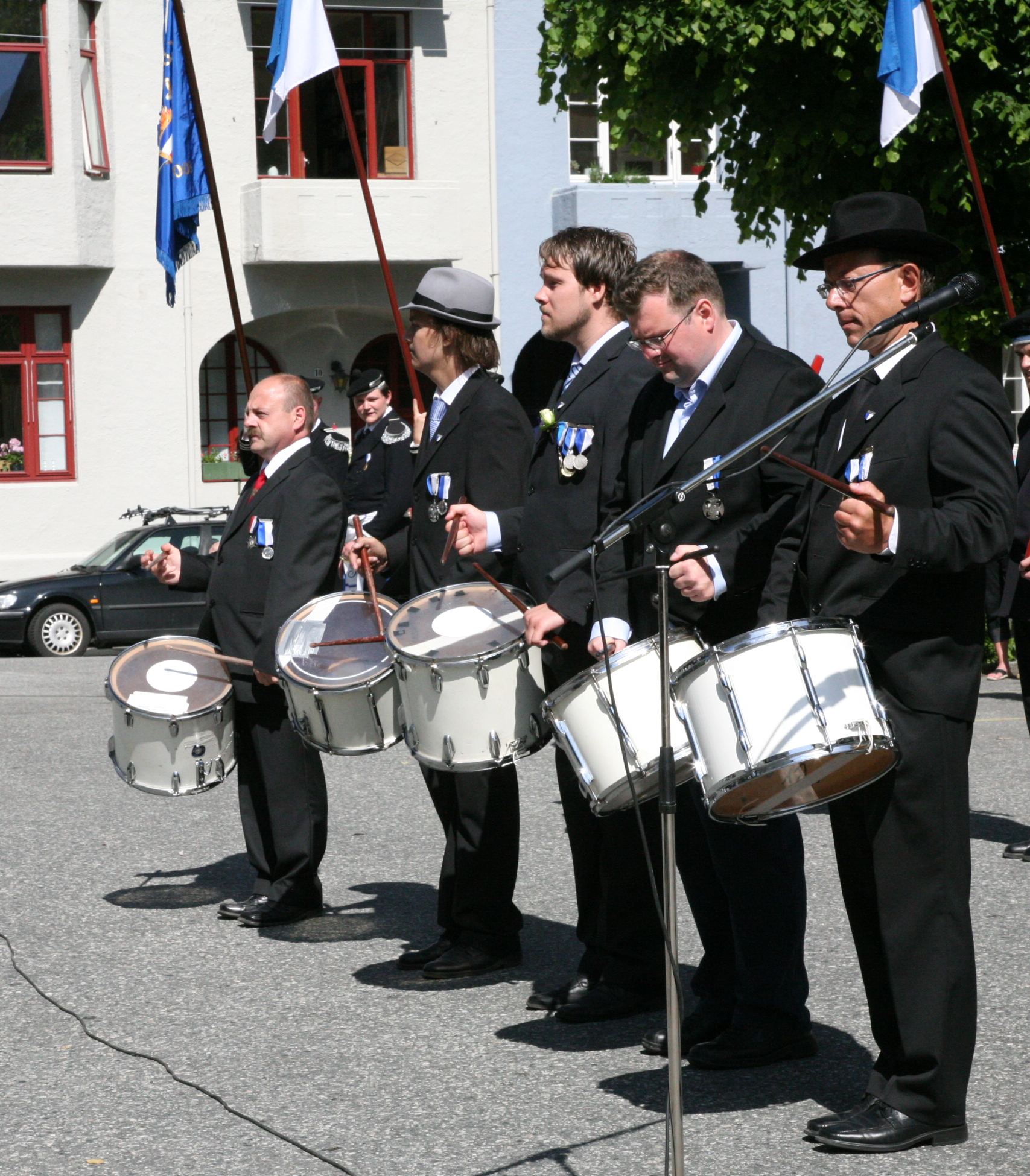 Vinnere buekorpsenes dag